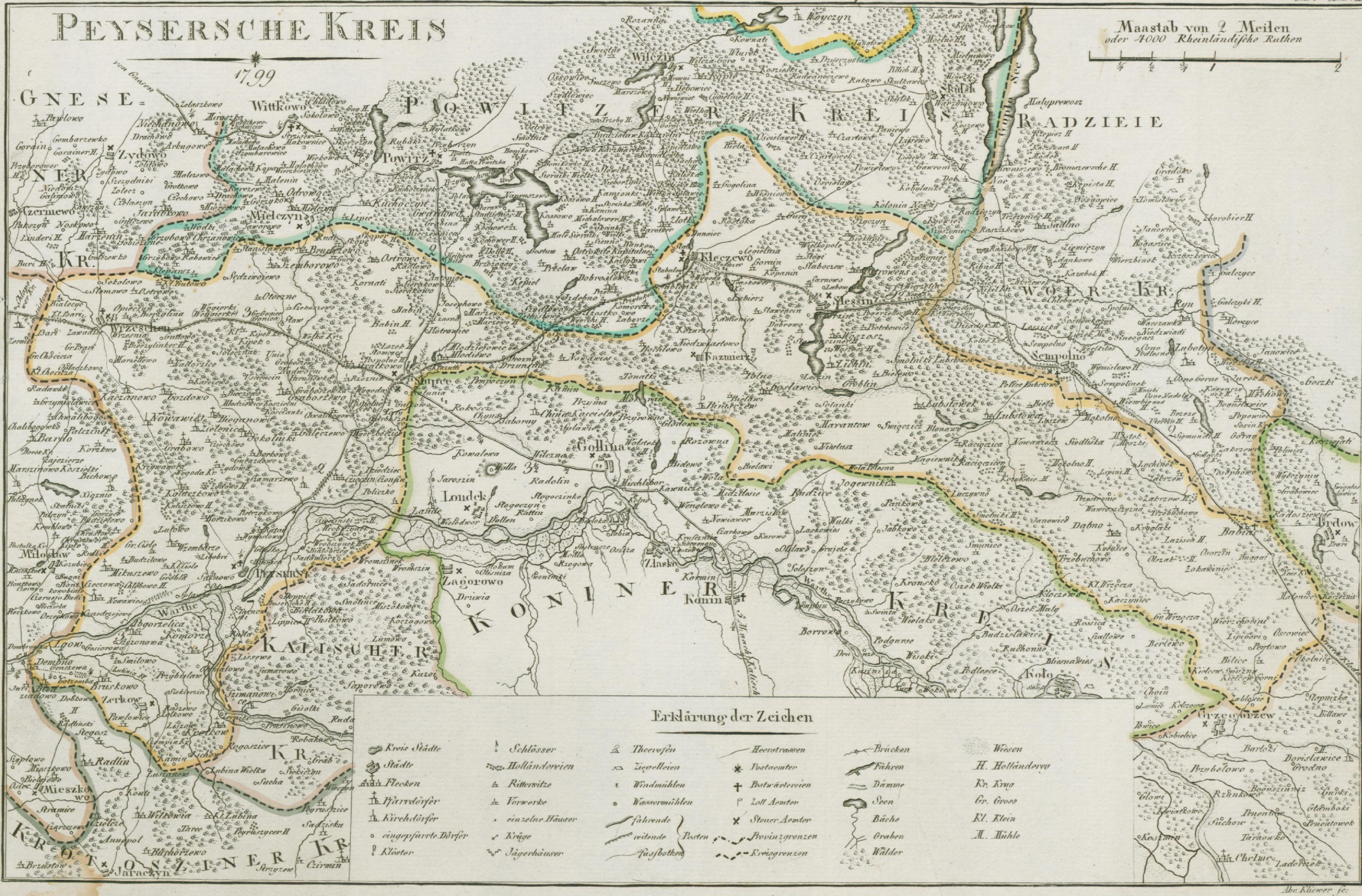 Map of "Kreis Peysern" as of 1798